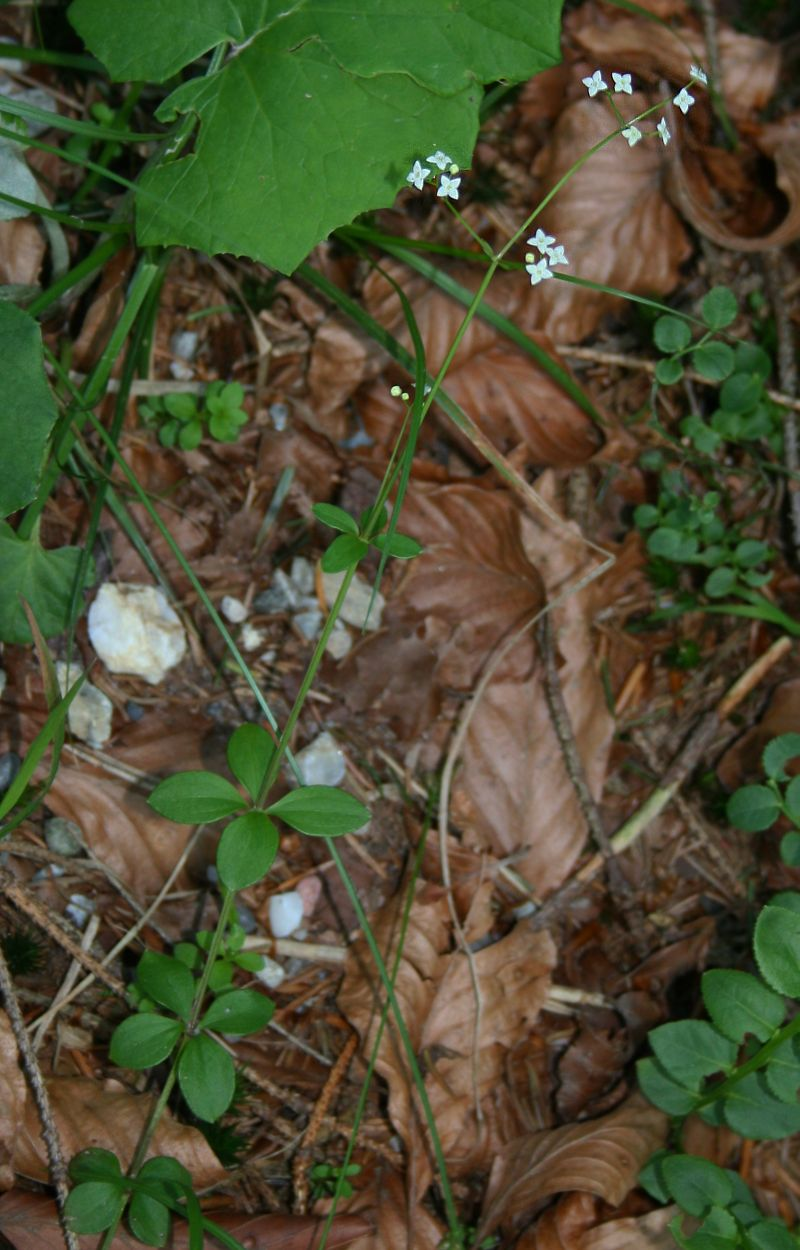 Rundblatt-Labkraut (Galium rotundifolium), Kaffeegewächse (Rubiaceae) - Österreich/Austria/Autriche: Oberösterreich, Hausruckviertel, ca. 2.6 km NE Forsthaus Redltal, ca. 670 m s.m.